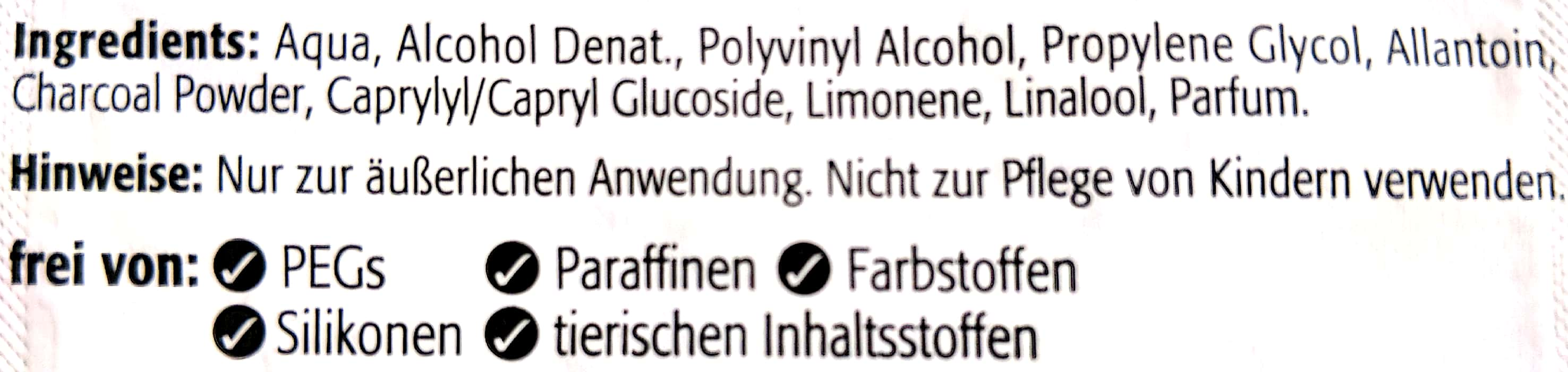 facial mask ingedrients